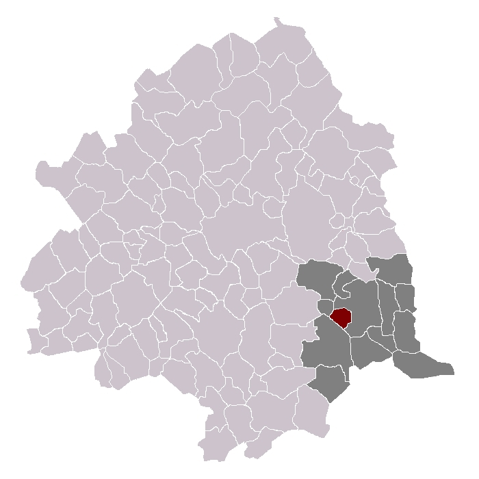 Louvil dans son canton et son arrondissement